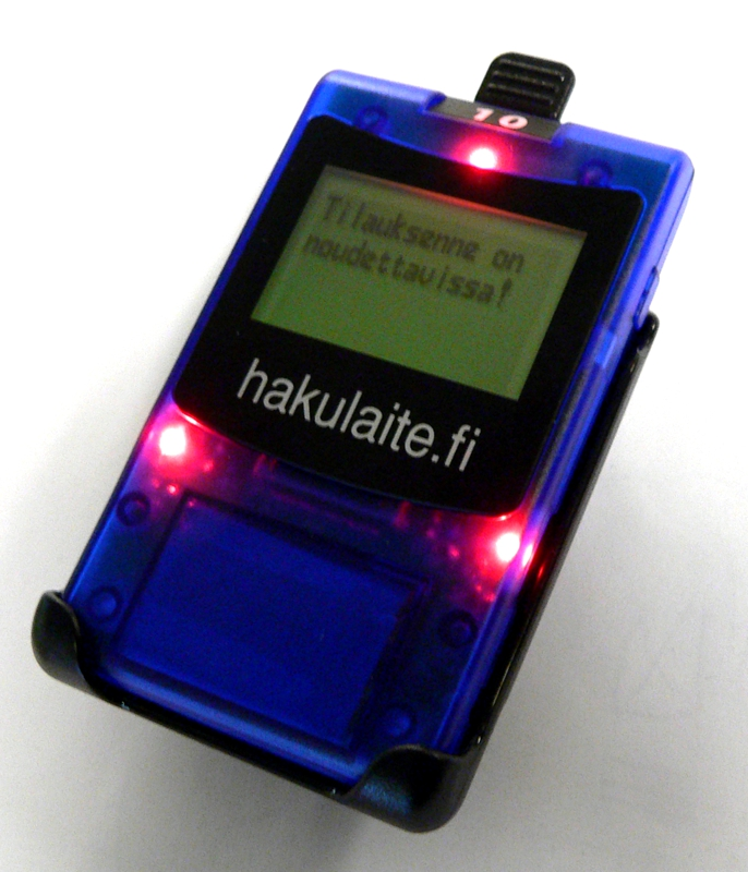 Kuvassa on nykyaikainen kaupallisessa käytössä oleva hakulaite